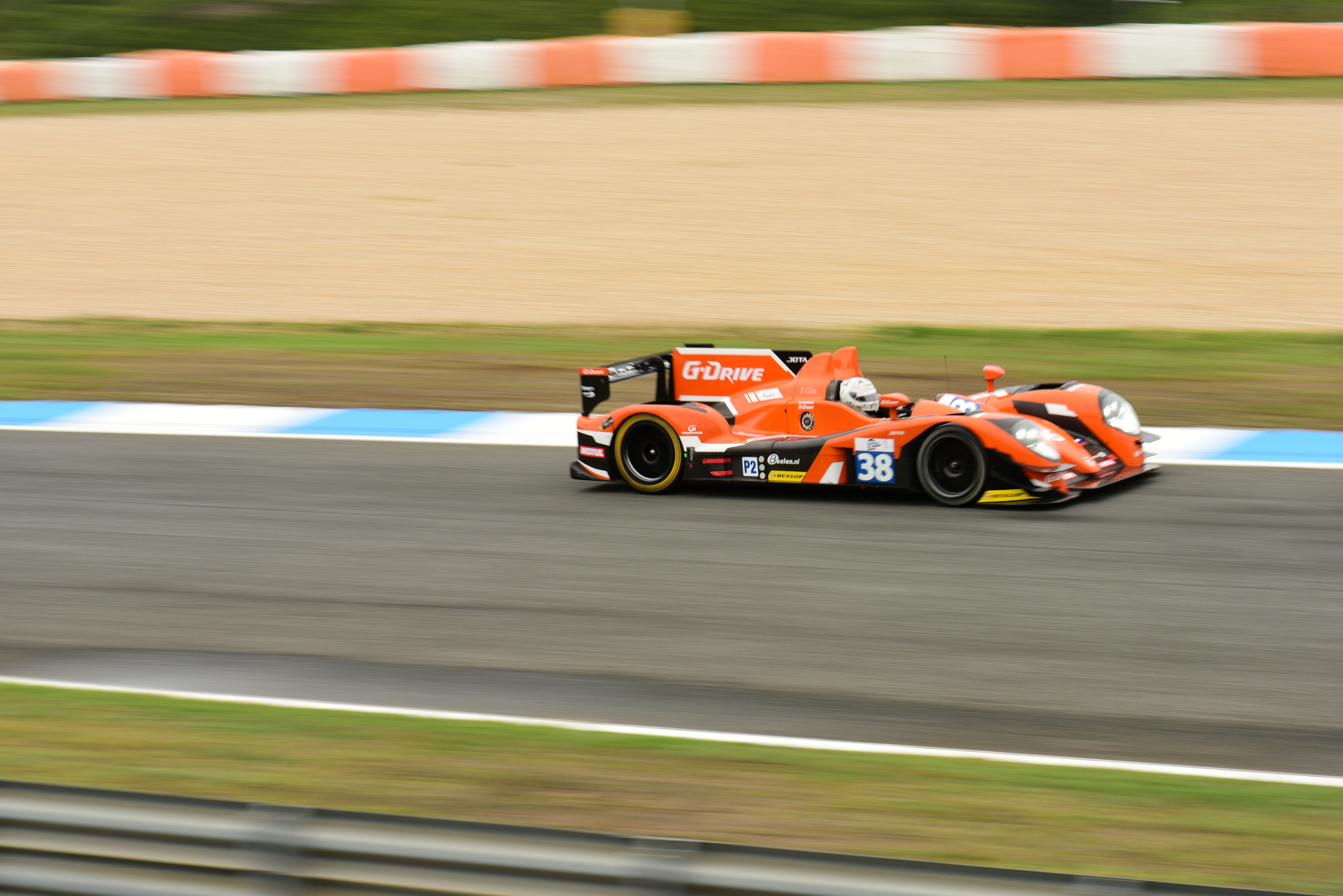 ELMS - 2016 - 4 Horas Estoril - Portugal